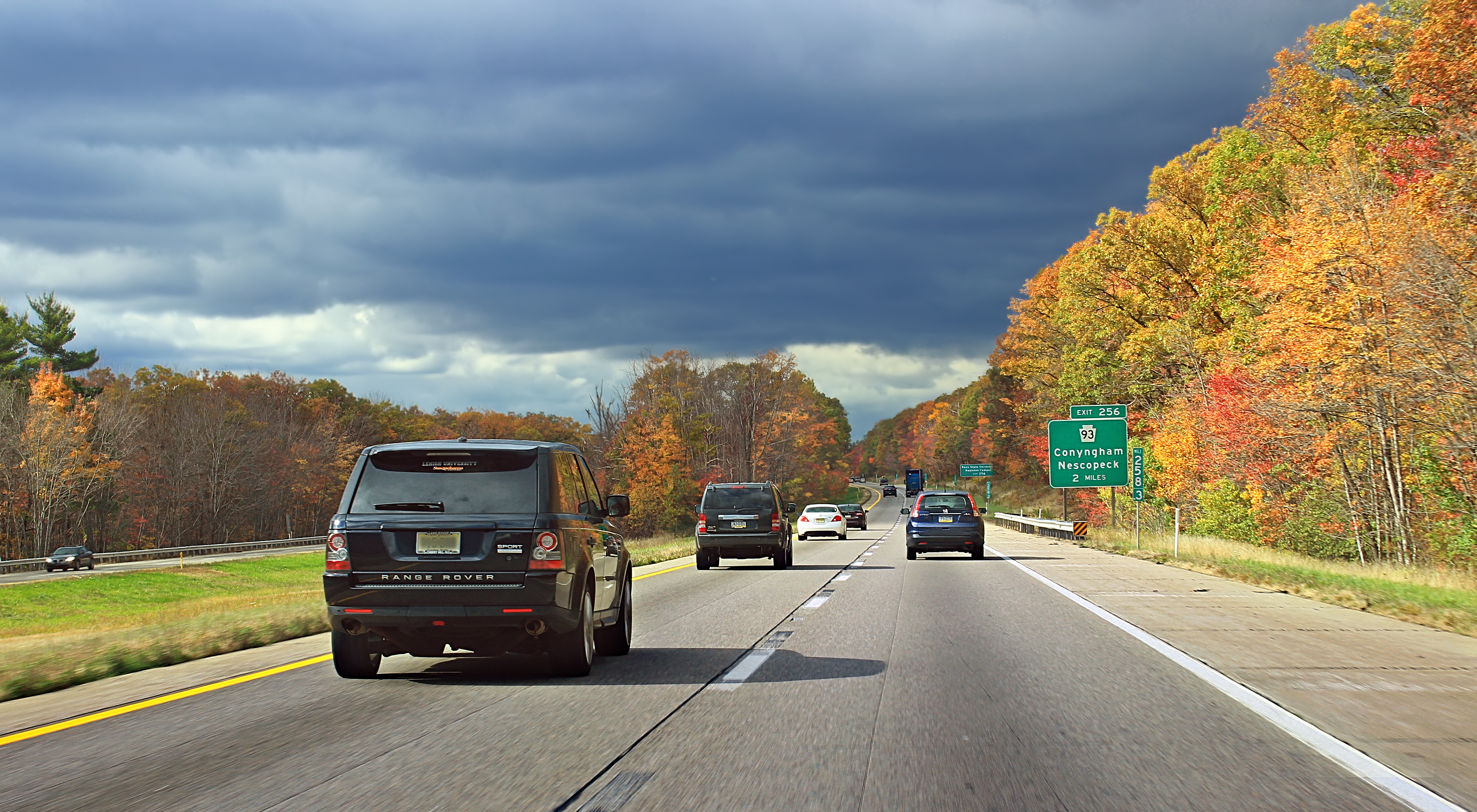 Interstate 80 West, Luzerne County.